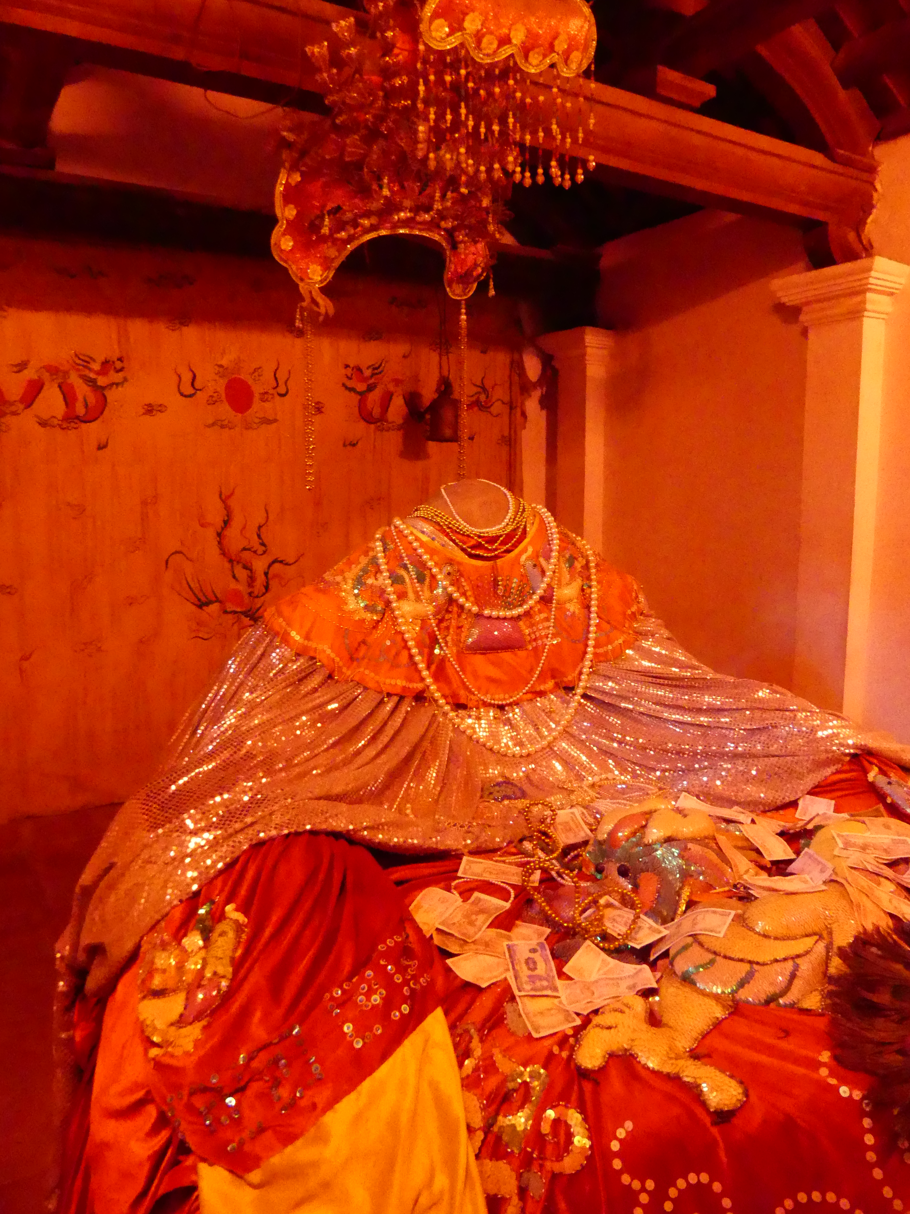 The headless statue of Princess My Chau in Co Loa, Dong Anh District, Hanoi, Vietnam